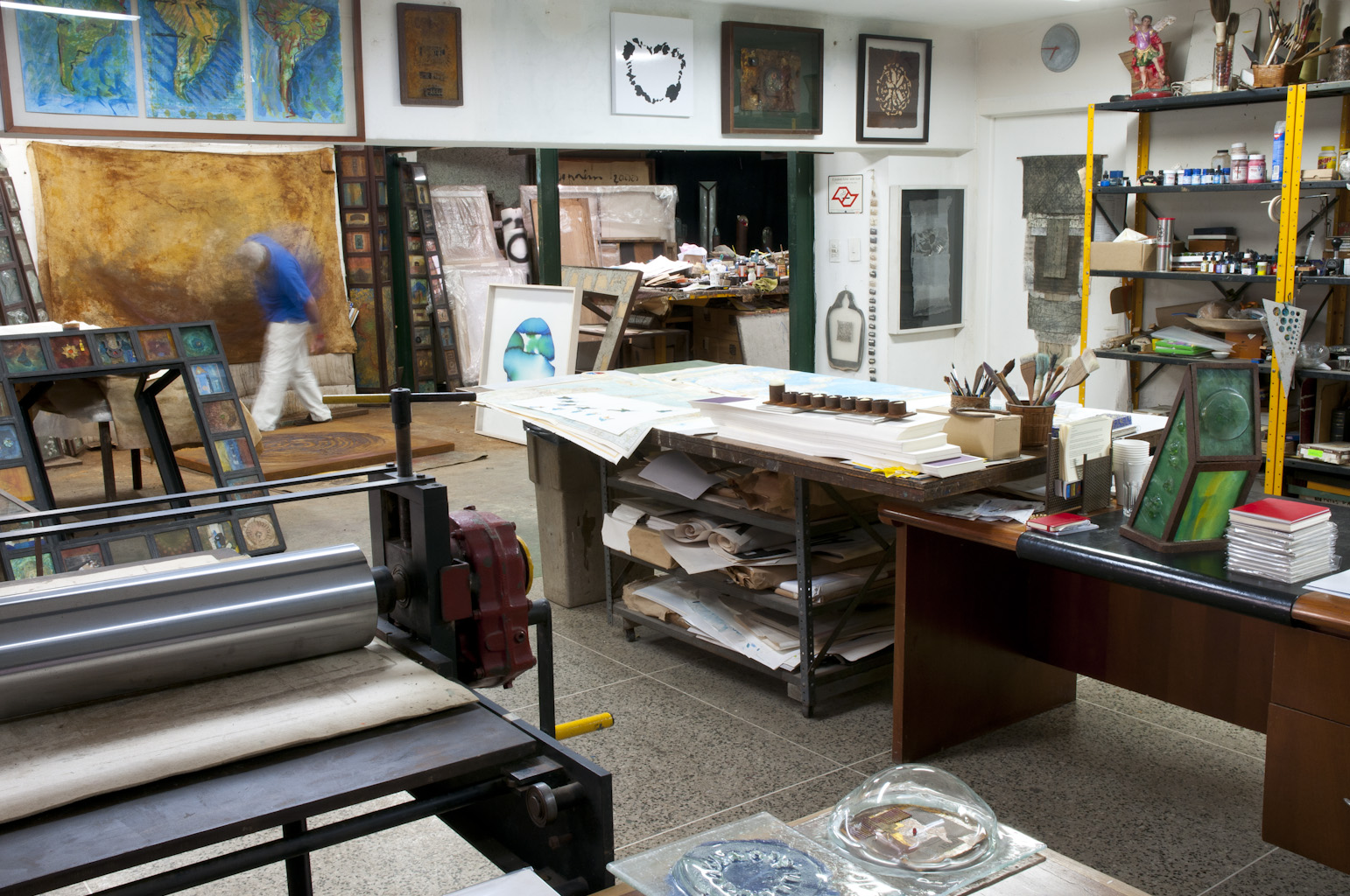 Ricardo Benaim trabajando en su TallerQuintaPapeles y fotografiado por Daniel Benaim